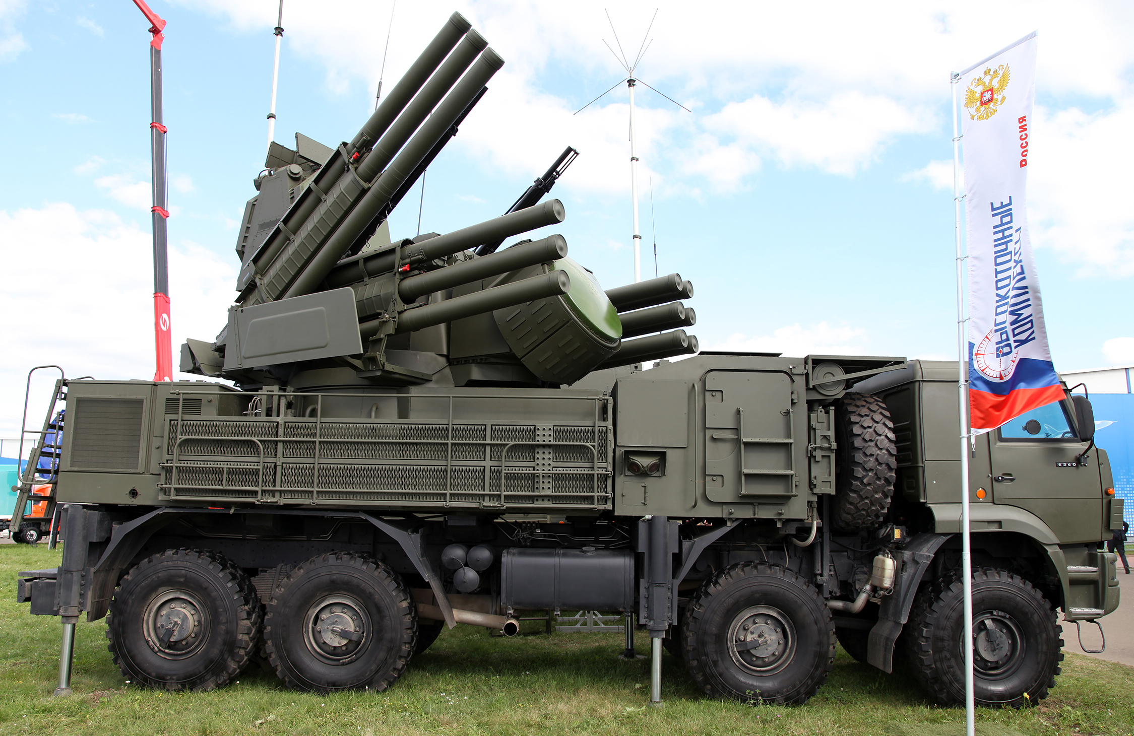 Боевая машина 72В6-Е4 из состава ЗРПК Панцирь-С1 (Pantsir-S1 system combat vehicle 72V6-E4)